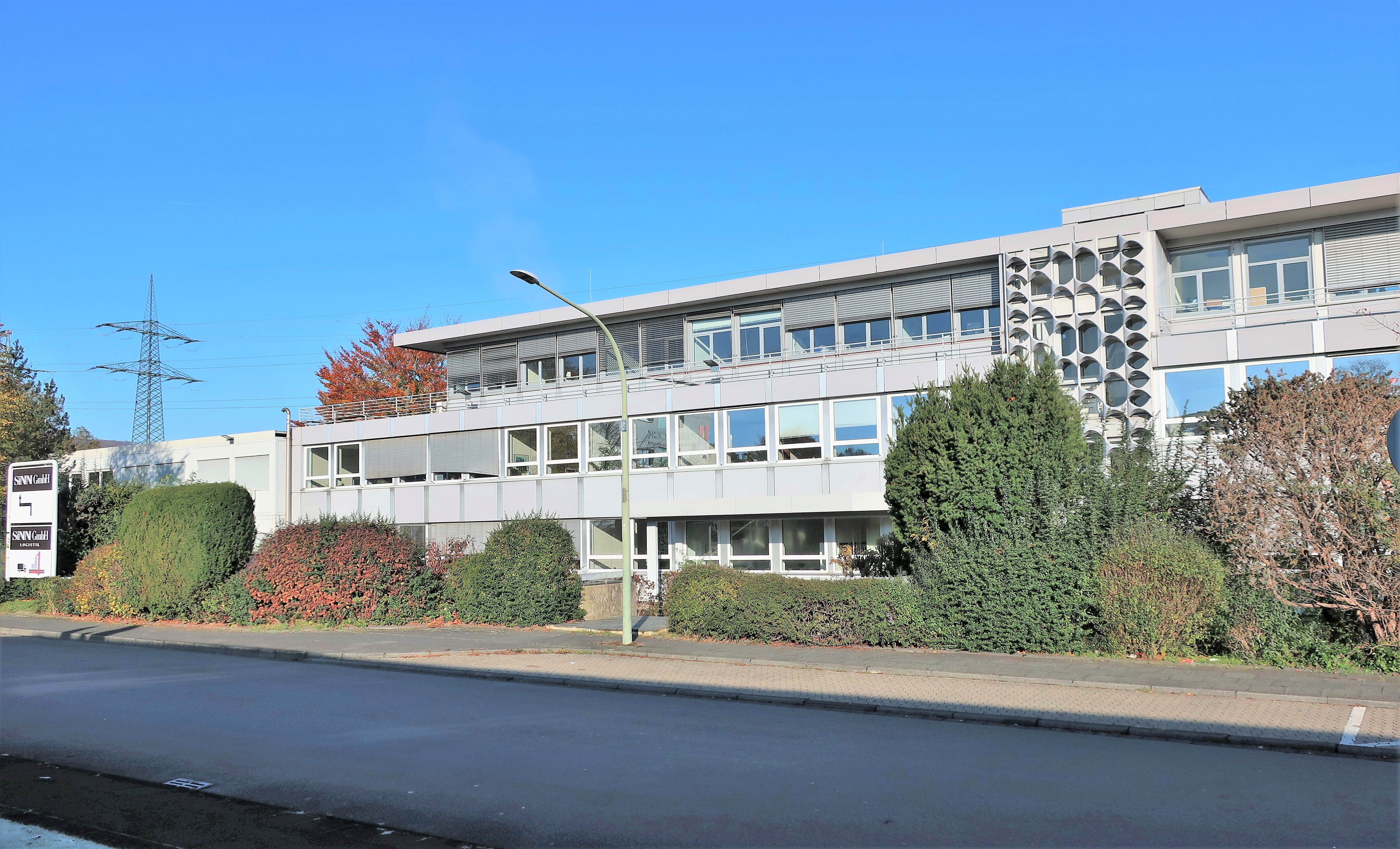 SiNN Unternehmenszentrale in Hagen-Bathey, Batheyer Straße 115–117. Blick von „Auf dem Graskamp“.